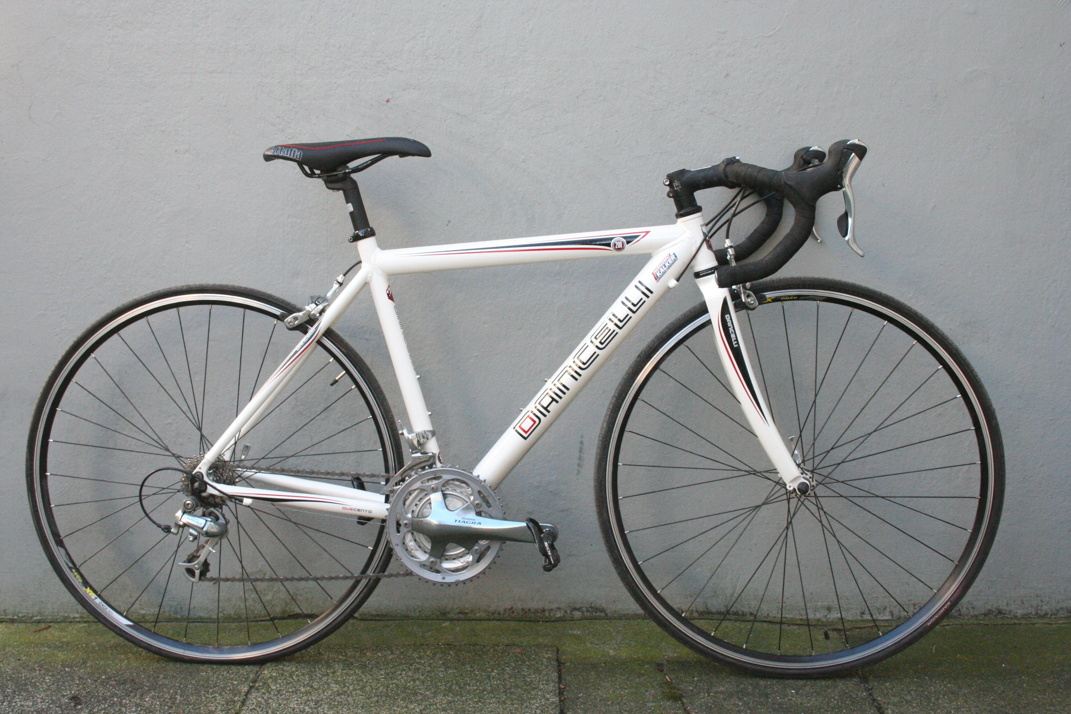 Dancelli Road Bike from 2010